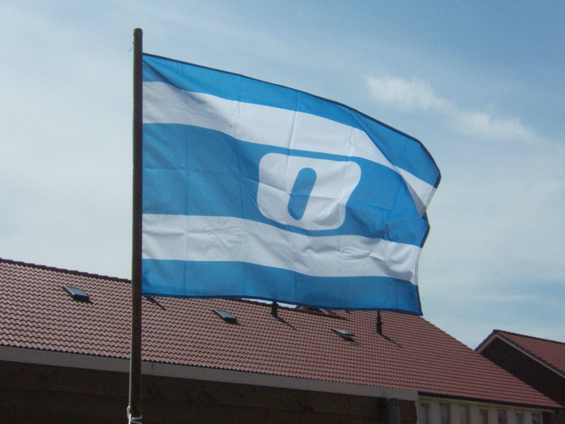 Vlag voormalig Aannemingsbedrijf Oosterwijk